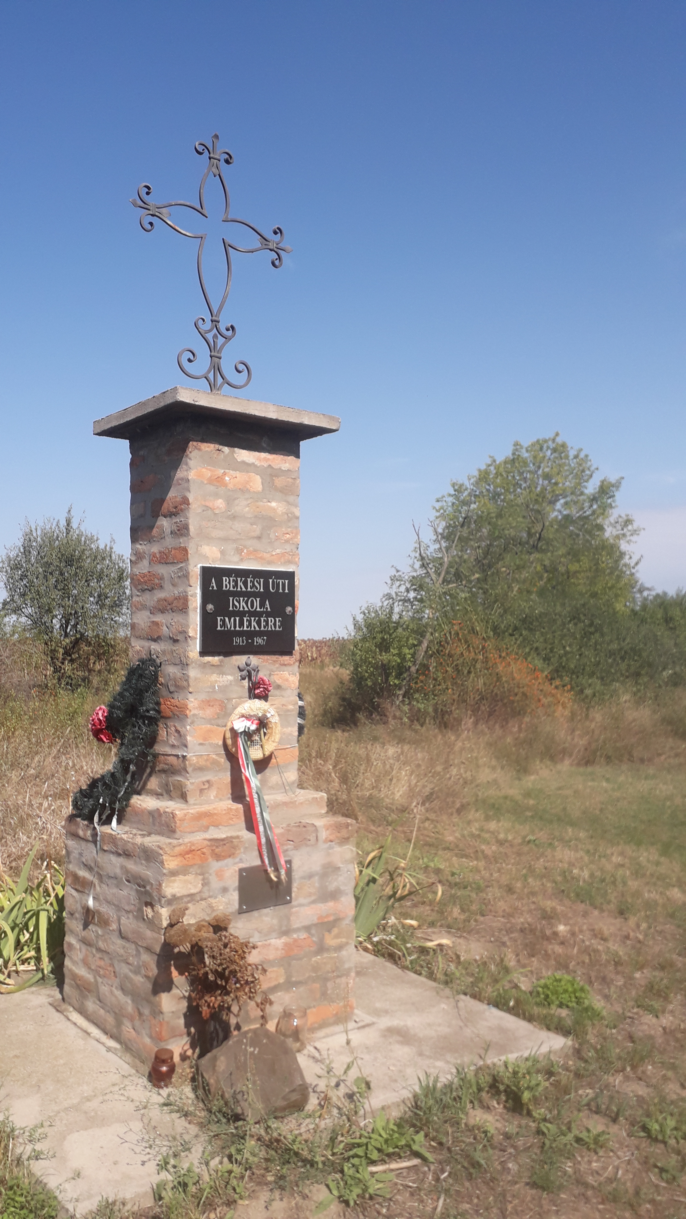 Békési Úti Iskola emlékműve